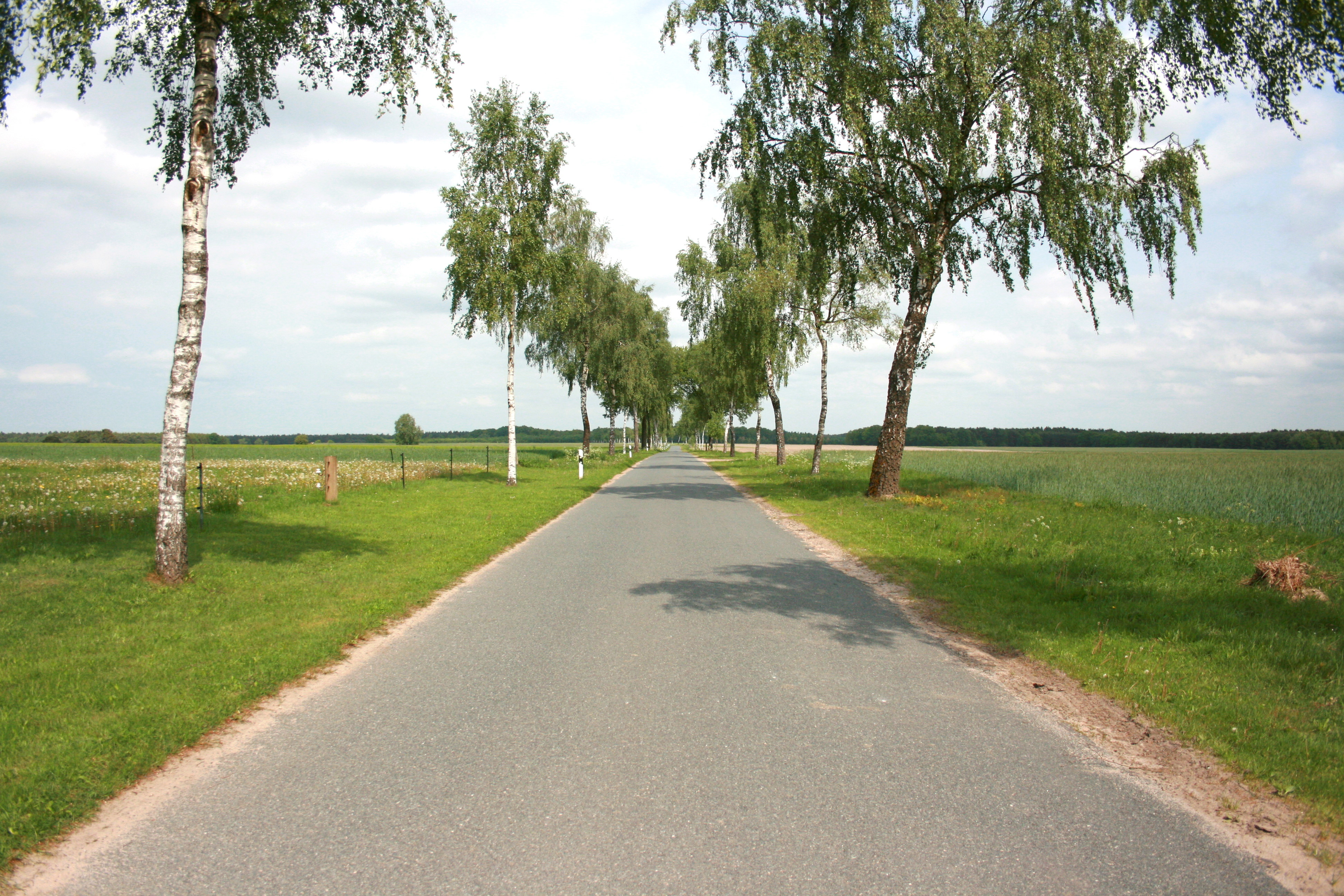 Behningen, Ortsteil vom Neuenkirchen (Lüneburger Heide)